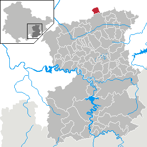 Stanau in Thuringia - Saale-Orla-Kreis